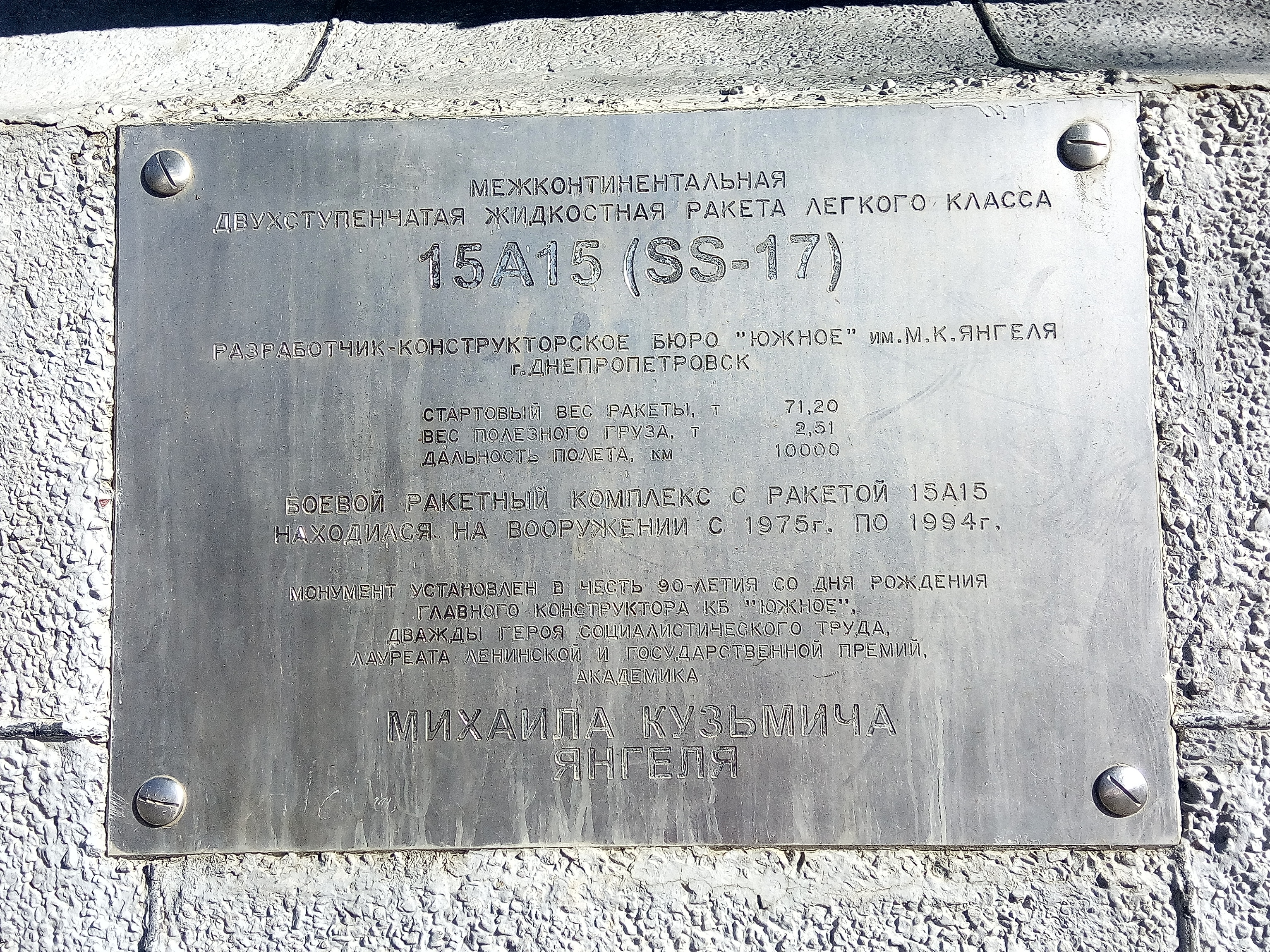 Аннотационная доска на памятнике ракете 15А15 (Байконур)